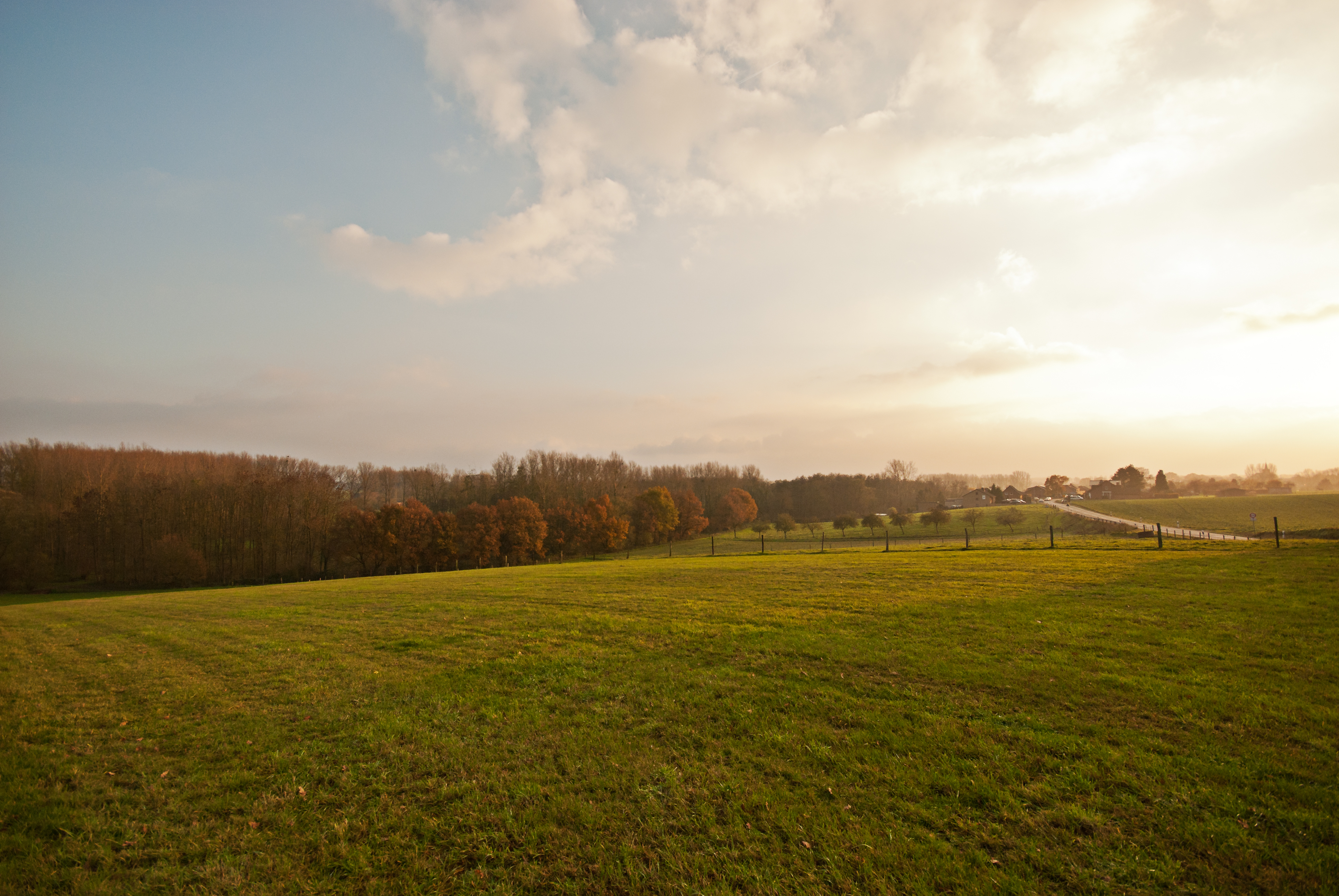 Blick vom Rand der Hauptterrassenfläche der Geilenkirchener Lehmplatte in die Wurmniederung bei Geilenkirchen-Nirm. Gut zu erkennen die hier noch vorhandenen Pappelkulturen anstelle des ursprünglichen Auwaldes.